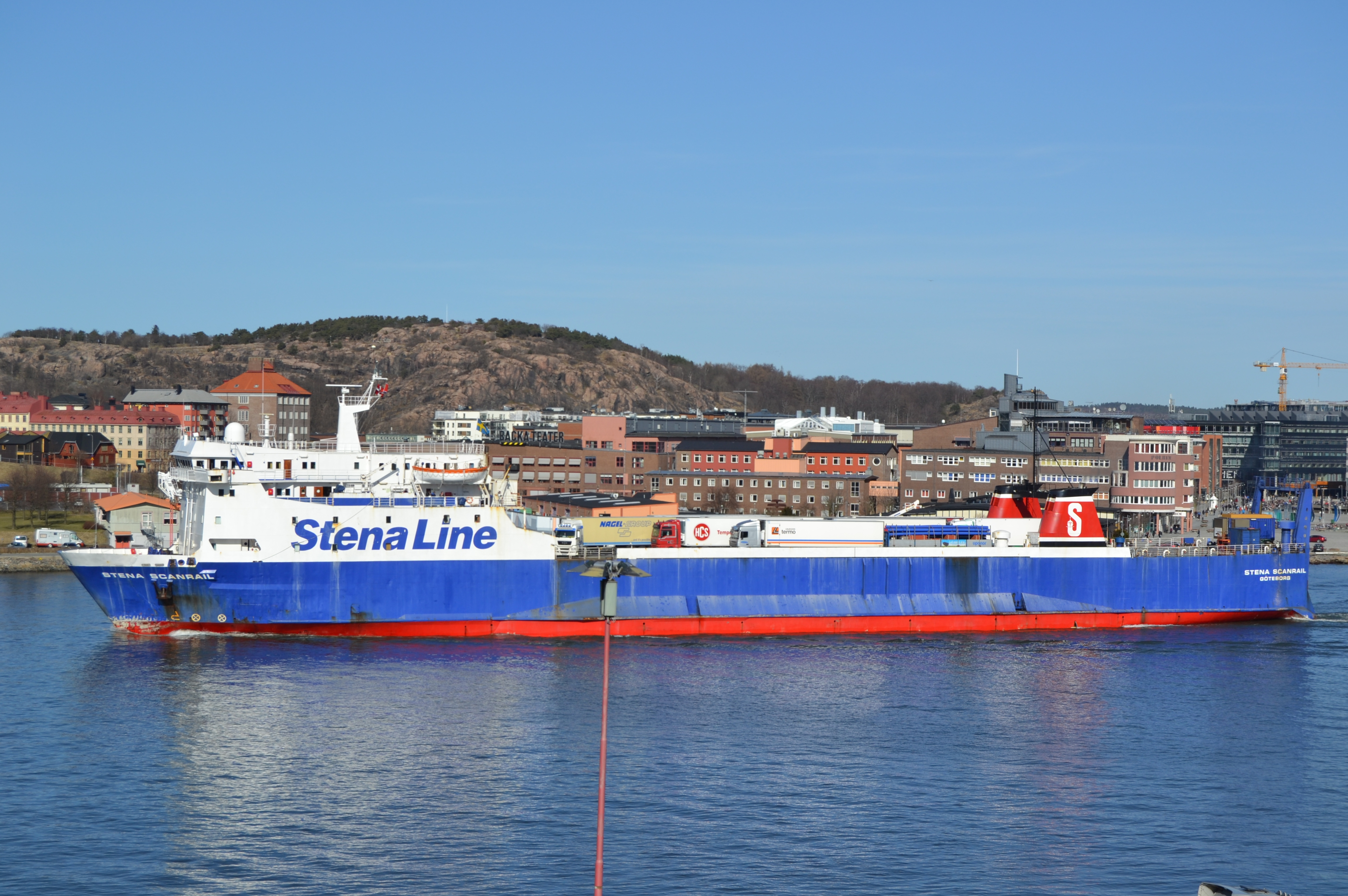 Stena Scanrail Passerar här Masthuggskajen